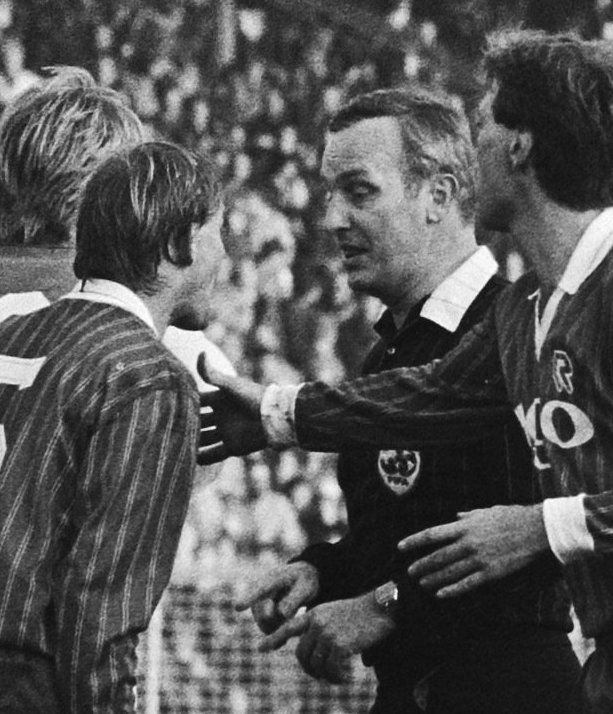 Collectie / Archief : Fotocollectie Anefo Reportage / Serie : Ajax tegen FC Groningen 5 - 5 Beschrijving : Groningers belagen scheidsrechter Geurds Datum : 23 januari 1983 Locatie : Amsterdam, Noord-Holland Trefwoorden : sport, voetbalwedstrijden Instellingsnaam : AJAX Fotograaf : Antonisse, Marcel / Anefo Auteursrechthebbende : Nationaal Archief Materiaalsoort : Negatief (zwart/wit) Nummer archiefinventaris : bekijk toegang 2.24.01.05 Bestanddeelnummer : 932-4744